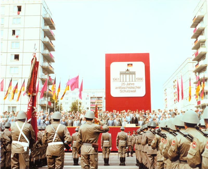 ADN-ZB/Franke/13.8.86 Berlin: Kampfappell Anläßlich des 25. Jahrestages der Errichtung des antifaschistischen Schutzwalls fand in der Karl-Marx-Allee ein Kampfappell statt, auf dem der Generalsekretär des ZK der SED und Vorsitzende des Staatsrates der DDR, Erich Honecker, sprach.